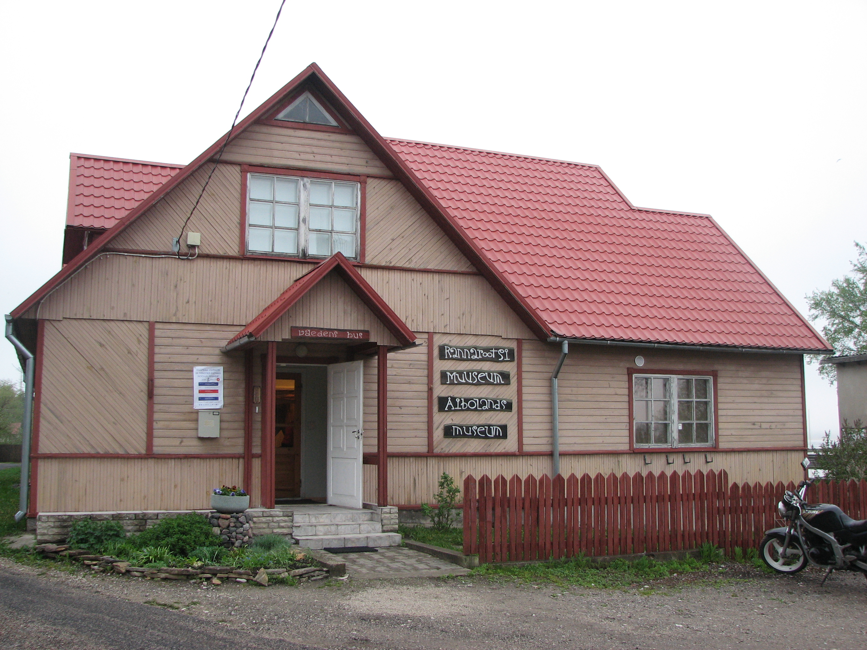 Rannarootsi muuseumi peahoone